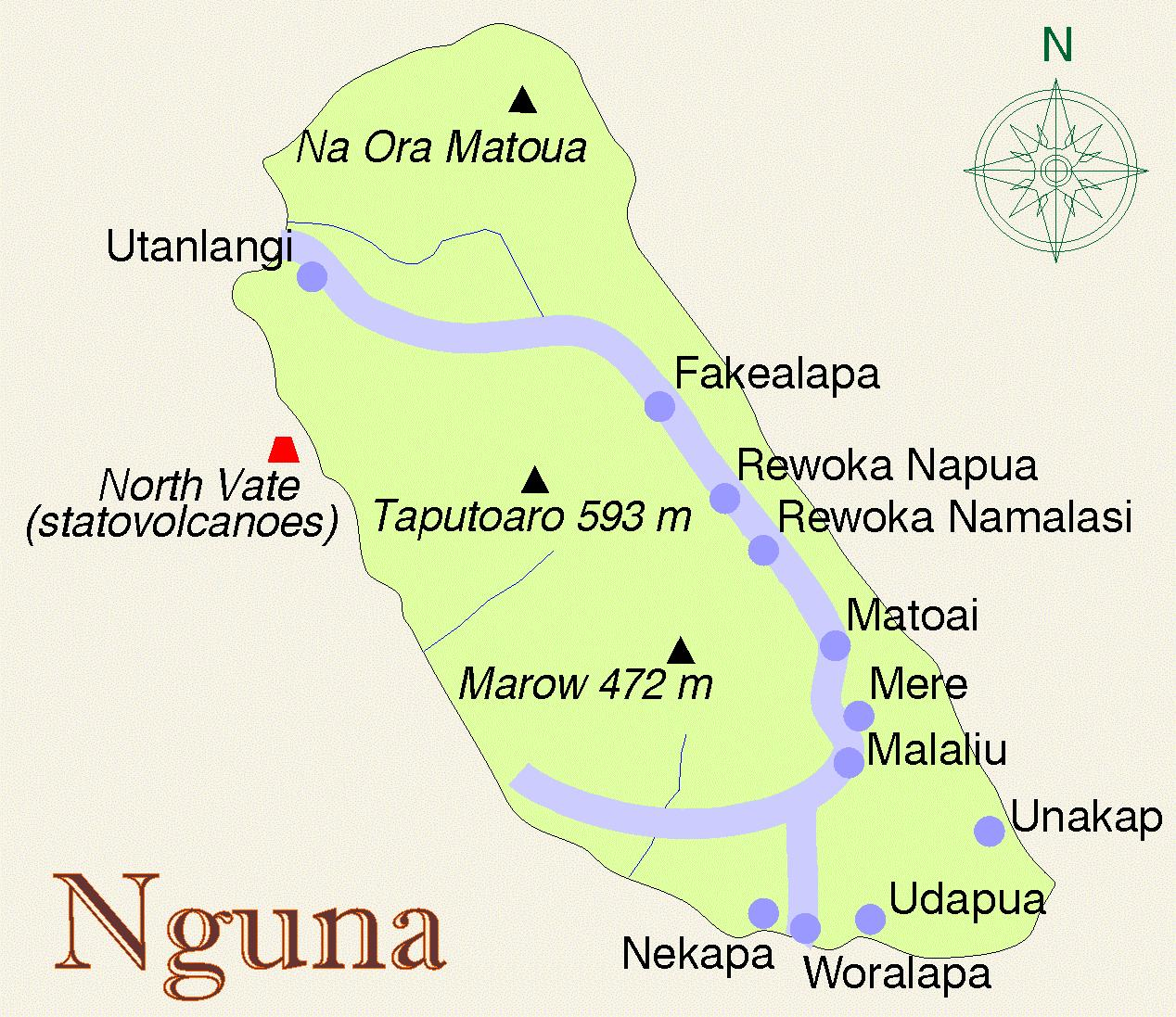 Карта на остров Нгуна.